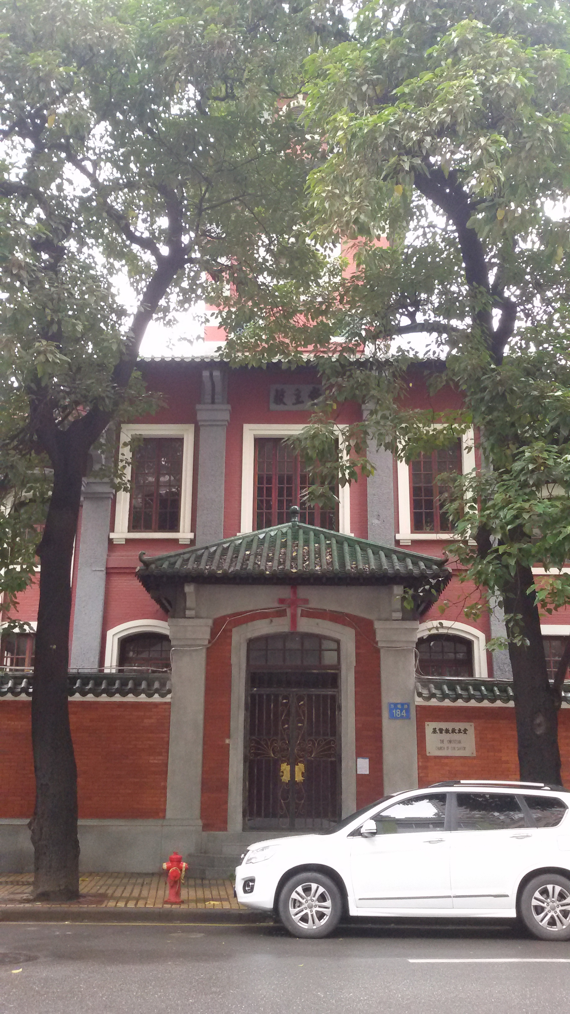 粵語: 廣州嘅救主堂